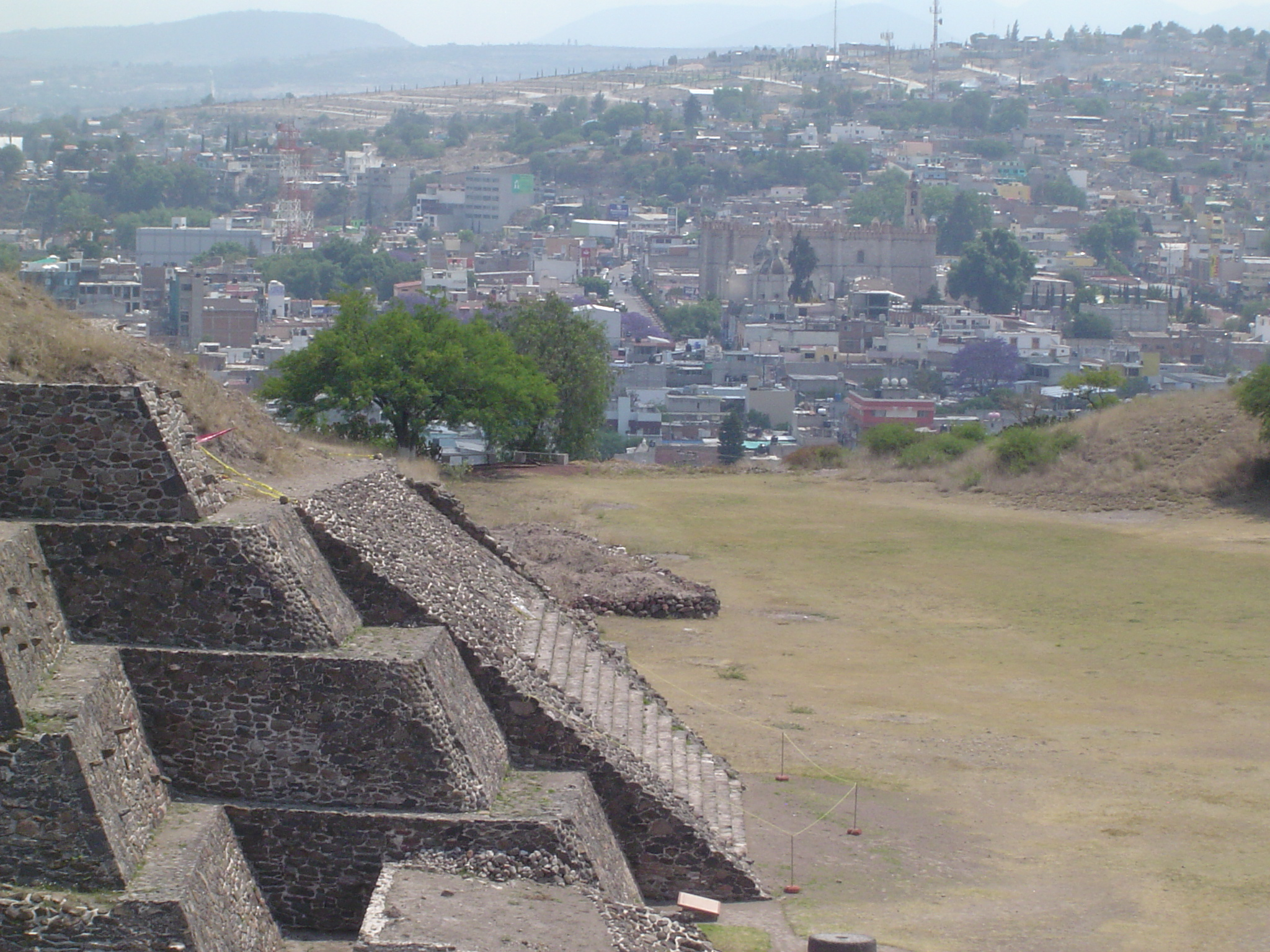 Panorámica de la zona arqueologica de Tula